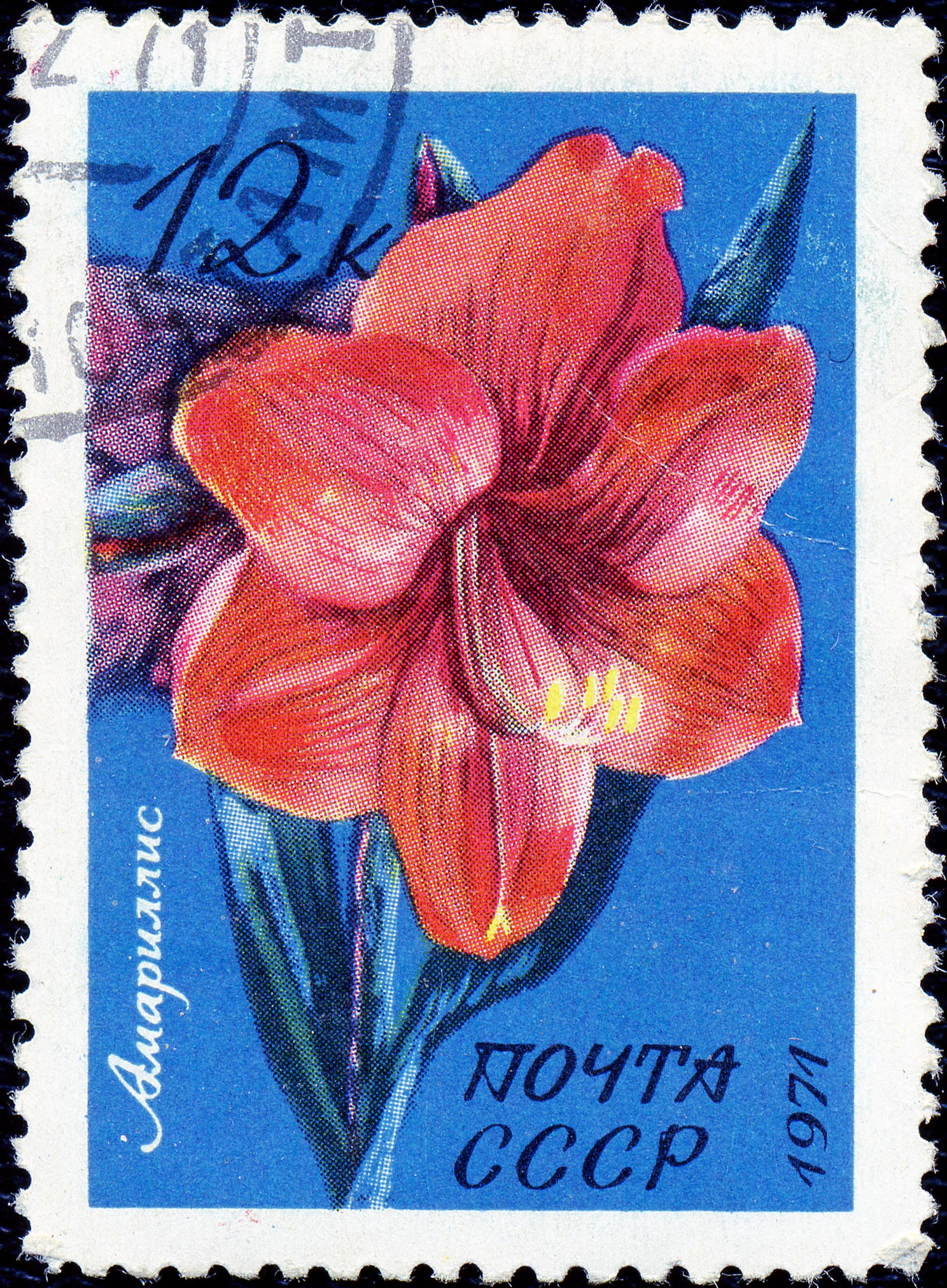 Почтовая марка СССР. 1971. Амарилис